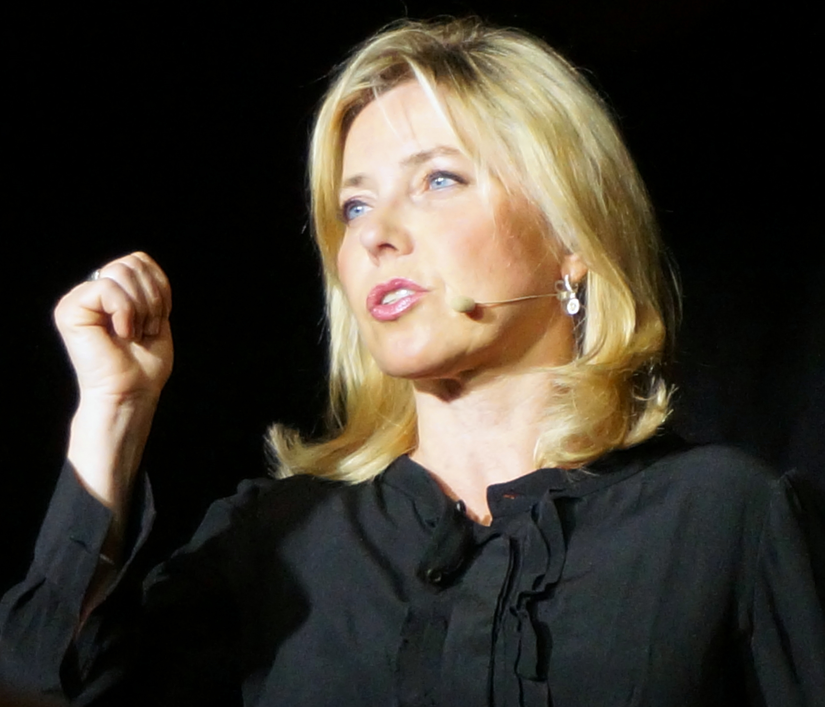 Die Kabarettistin Simone Solga mit ihrem Programm "Im Auftrag Ihrer Kanzlerin" in Etterschlag beim Alten Wirt am 31. März 2014